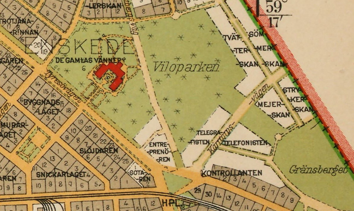 Del av karta över Stockholm med omnejd "Enskede", visande Viloparken.